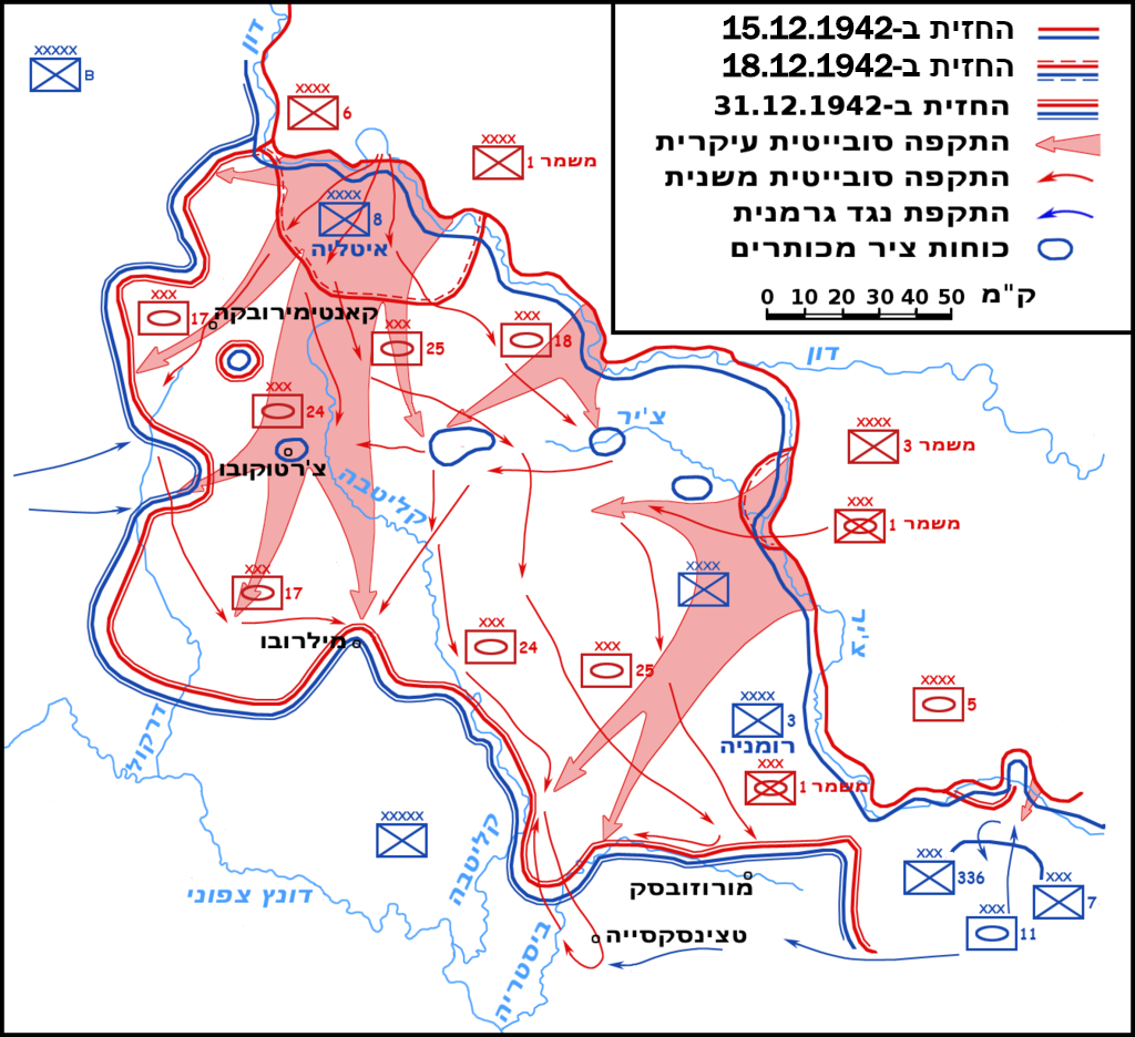 מפת מבצע סטורן קטן, קרב סטלינגרד